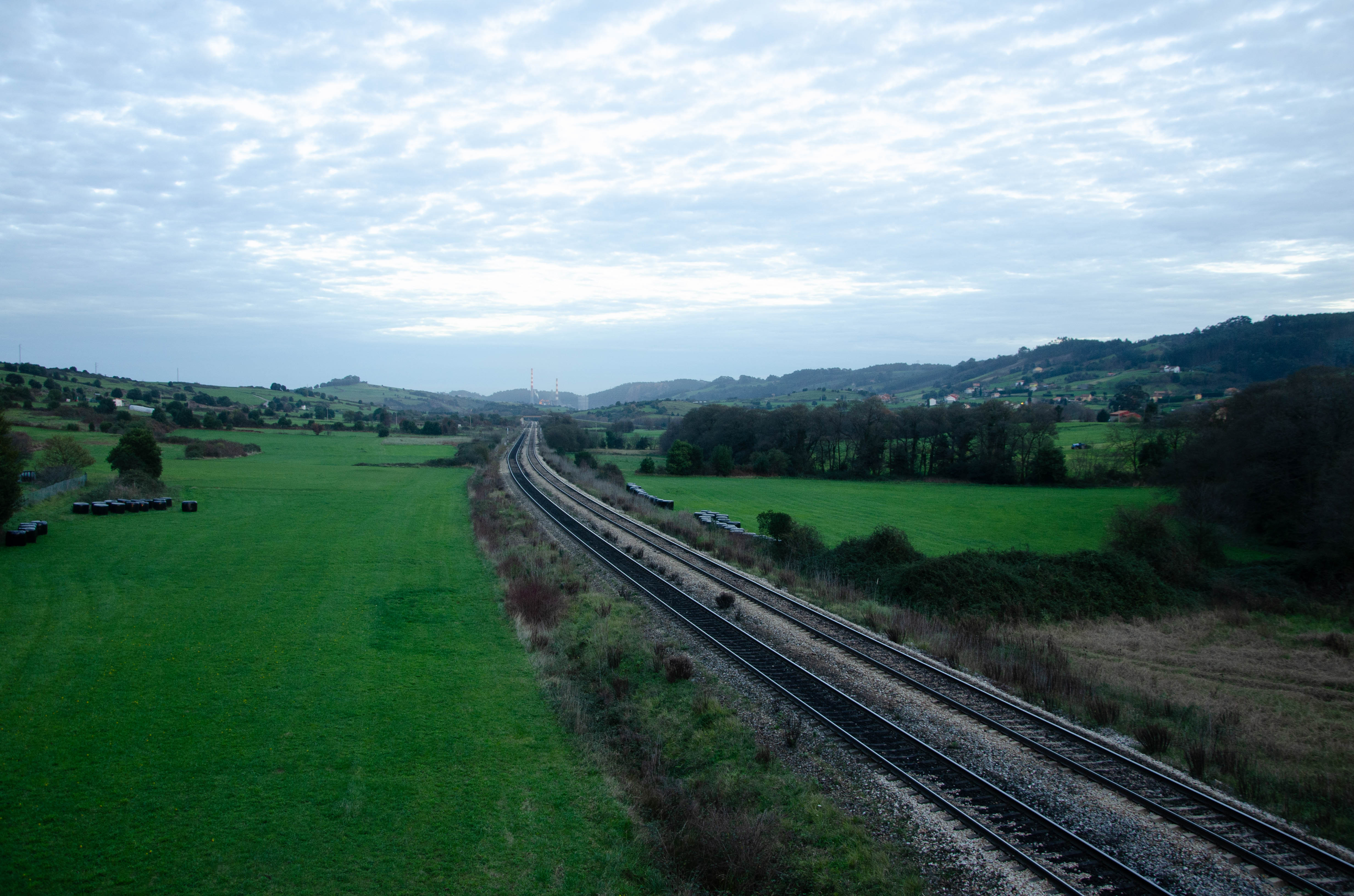 Ferrocarril de ArcelorMittal de El Valle, Carreño, Asturias